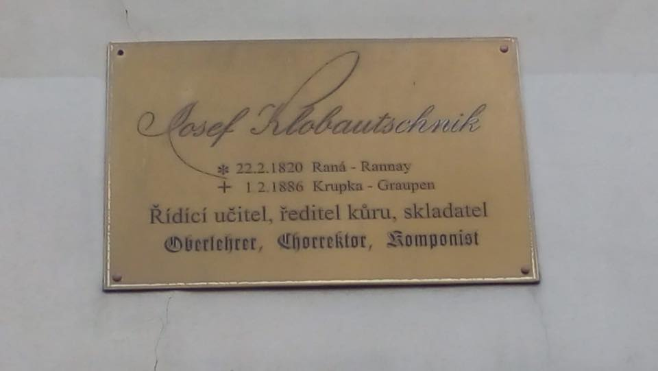 Vzpomínka na Krupského řídícího učitele, ředitele kůru kostela Nanebevzetí Panny Marie v Husitské ulici.